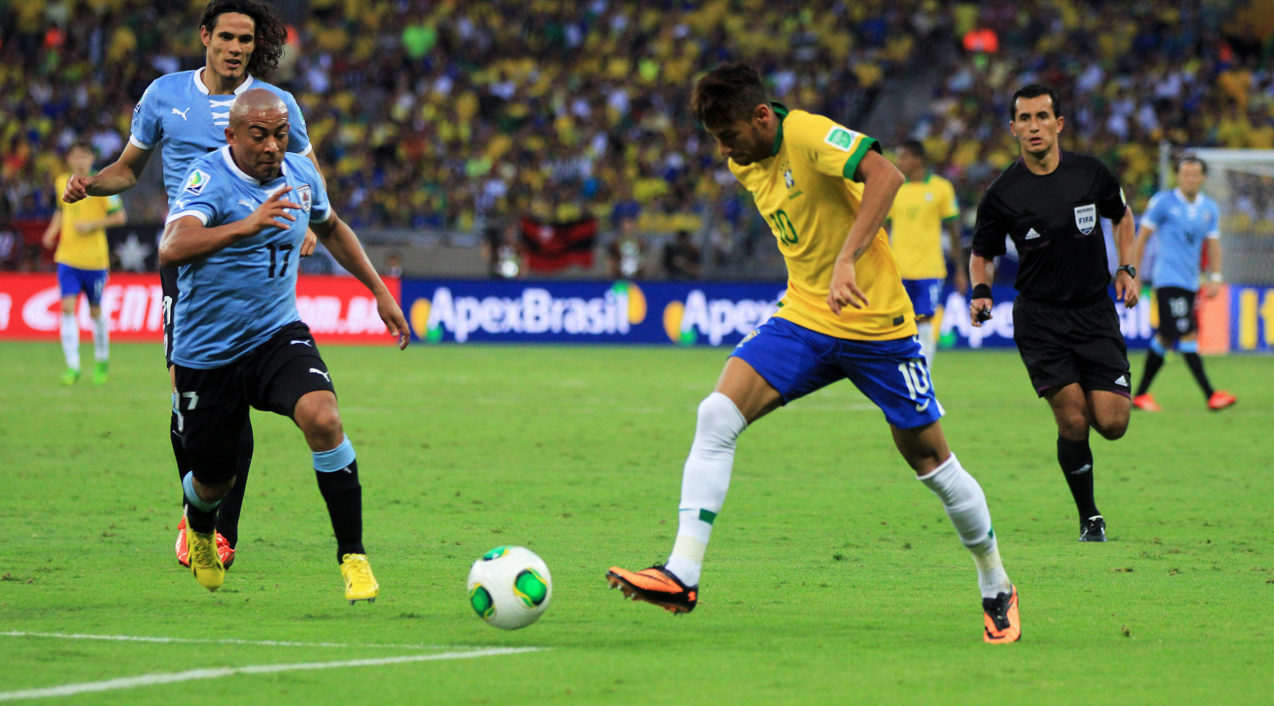 Neymar, futebolista brasileiro, em ação em jogo contra o Uruguai, Copa das Confederações 2013